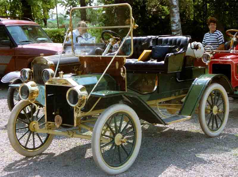 Ford Model S Runabout 1908